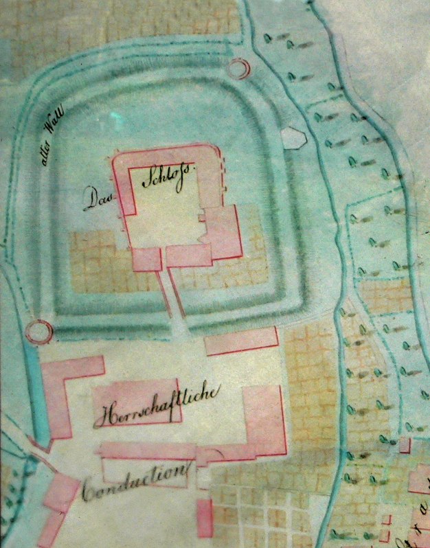 Schloss Rodenberg 1837